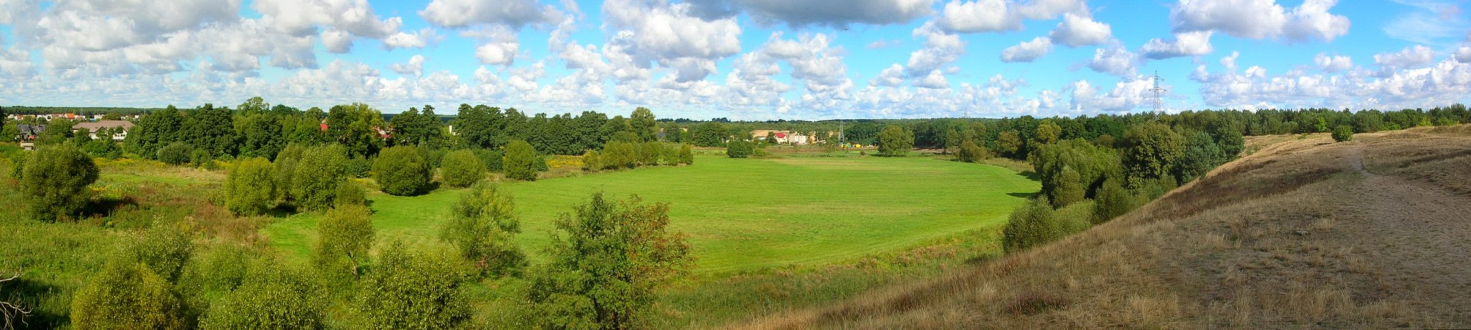 Terasy doliny Brdy na Jachcicach w Bydgoszczy